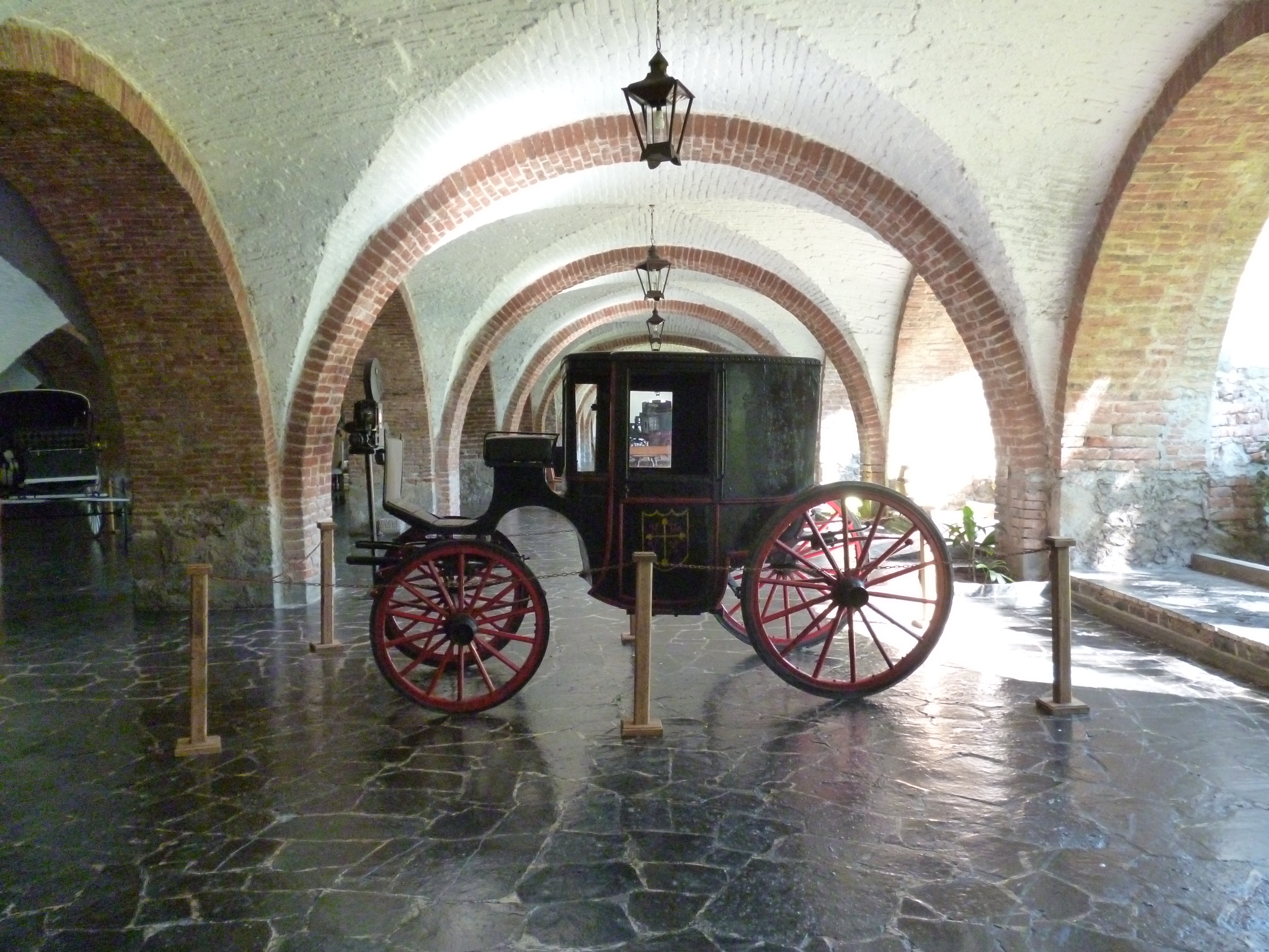 carreta antigua, que era utilizada por los dueños de la Hacienda Vista Hermosa, ubicada en el pueblo que Tequesquitengo, Morelos, México.